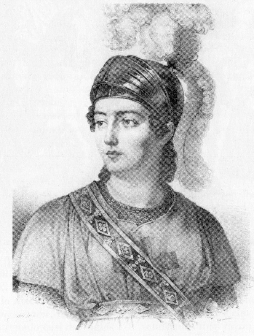 זמרת הסופרן האיטלקית ג'ודיטה פסטה (1797-1865) בתפקיד טאנקרדי באופרה "טאנקרדי" בהפקת הבכורה הצרפתית, 1822.